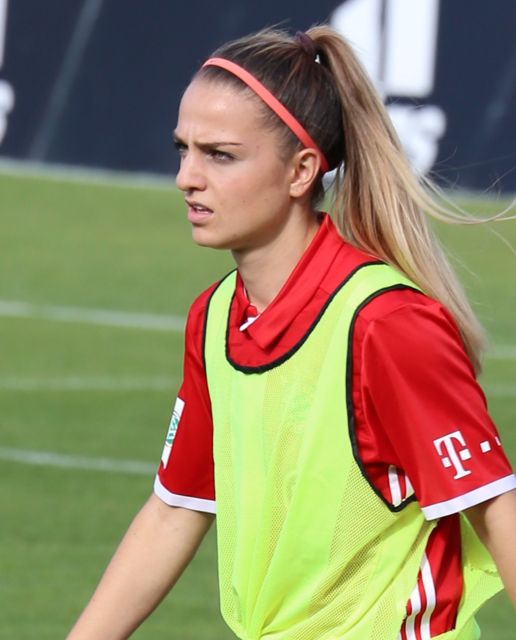 Melike Pekel, FC Bayern München, beim Aufwärmen vor dem Frauen-Bundesliga-Spiel FC Bayern München gegen SC Freiburg am 3. September 2016 im Stadion an der Grünwalder Straße (Ergebnis war 1:1).